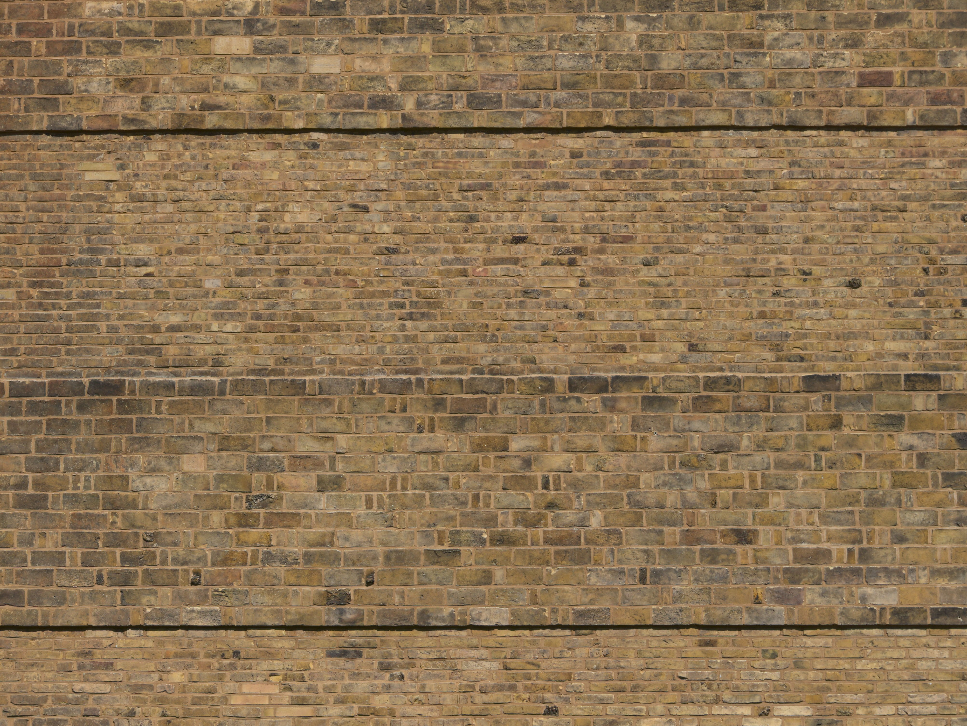 typische Ziegelmauer des Architekten Gustav Oelsner